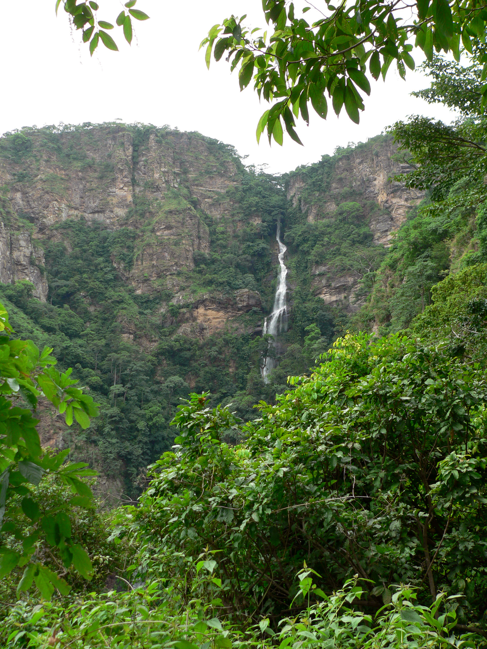 Wli-fall in Ghana, Volta Region